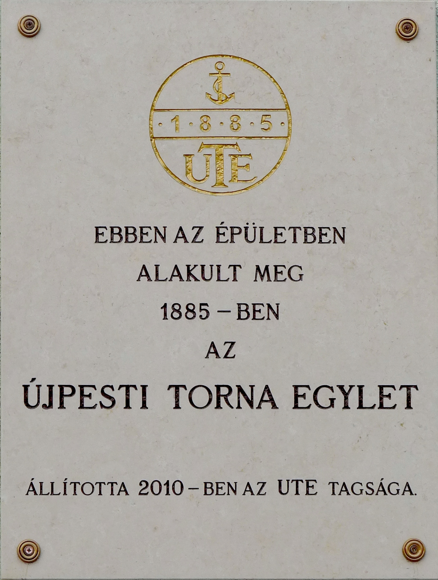 Az Újpesti Tornaegylet 1885. évi megalakításának helyére emlékeztető tábla. Budapest, IV. ker. Szent István tér 19.